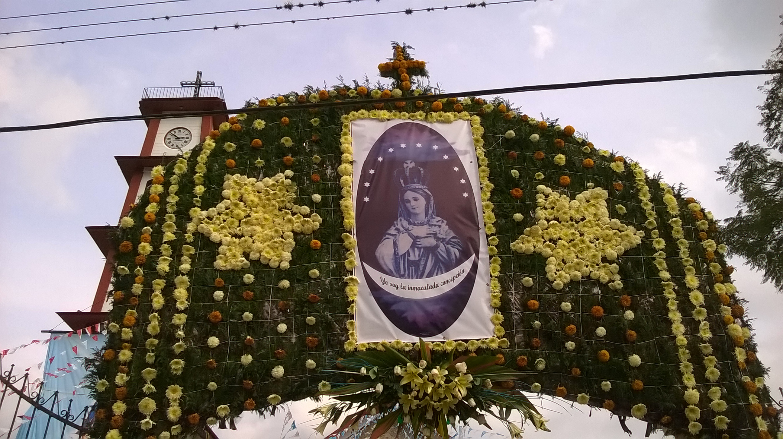 Fiestas patronales de Ixtaczoquitlán, Veracruz